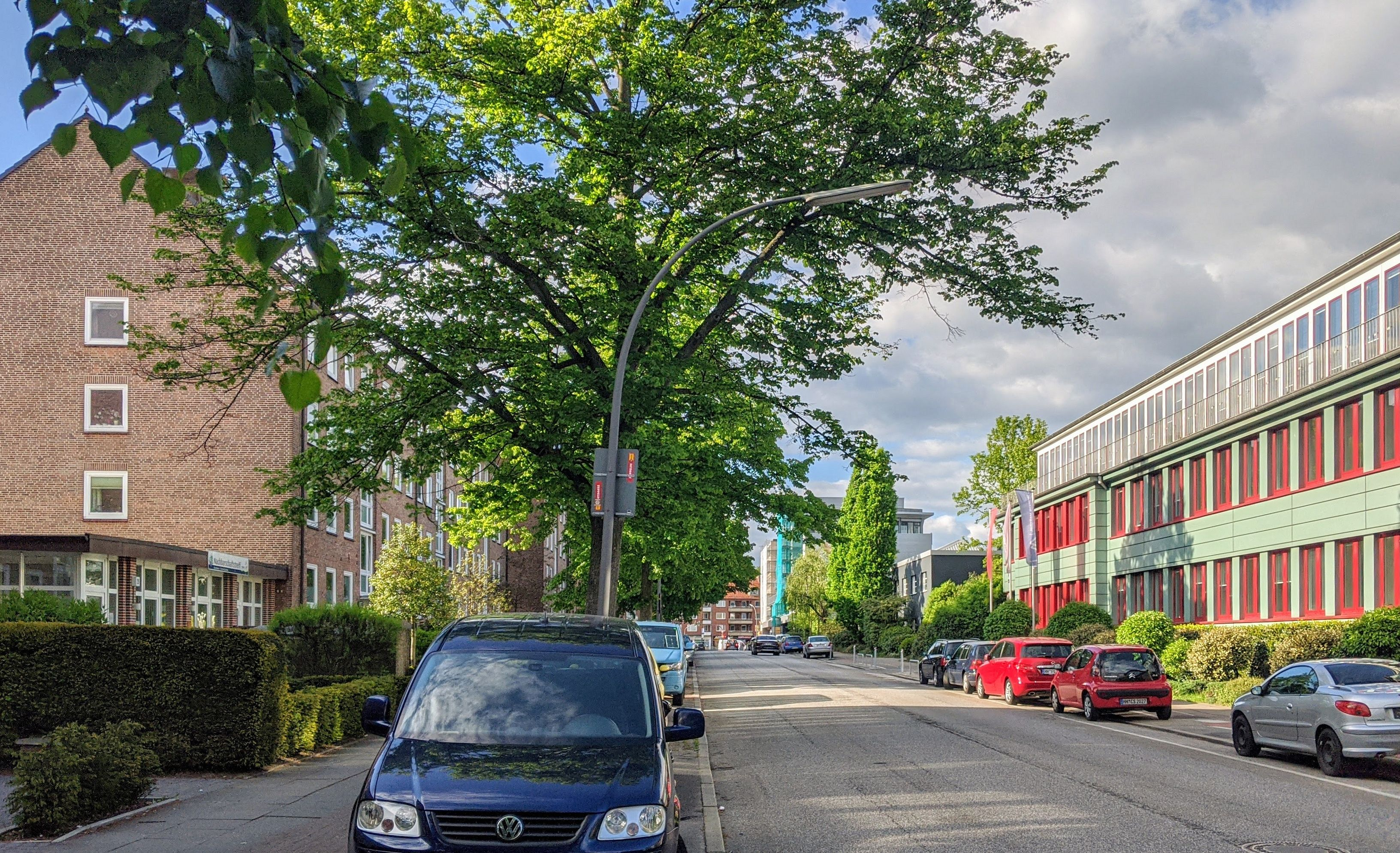 Hammer Steindamm in Hamburg-Eilbek, Blick Richtung Norden zur Wandsbeker Chaussee, links Wohnbebauung, rechts Gewerbegebiet